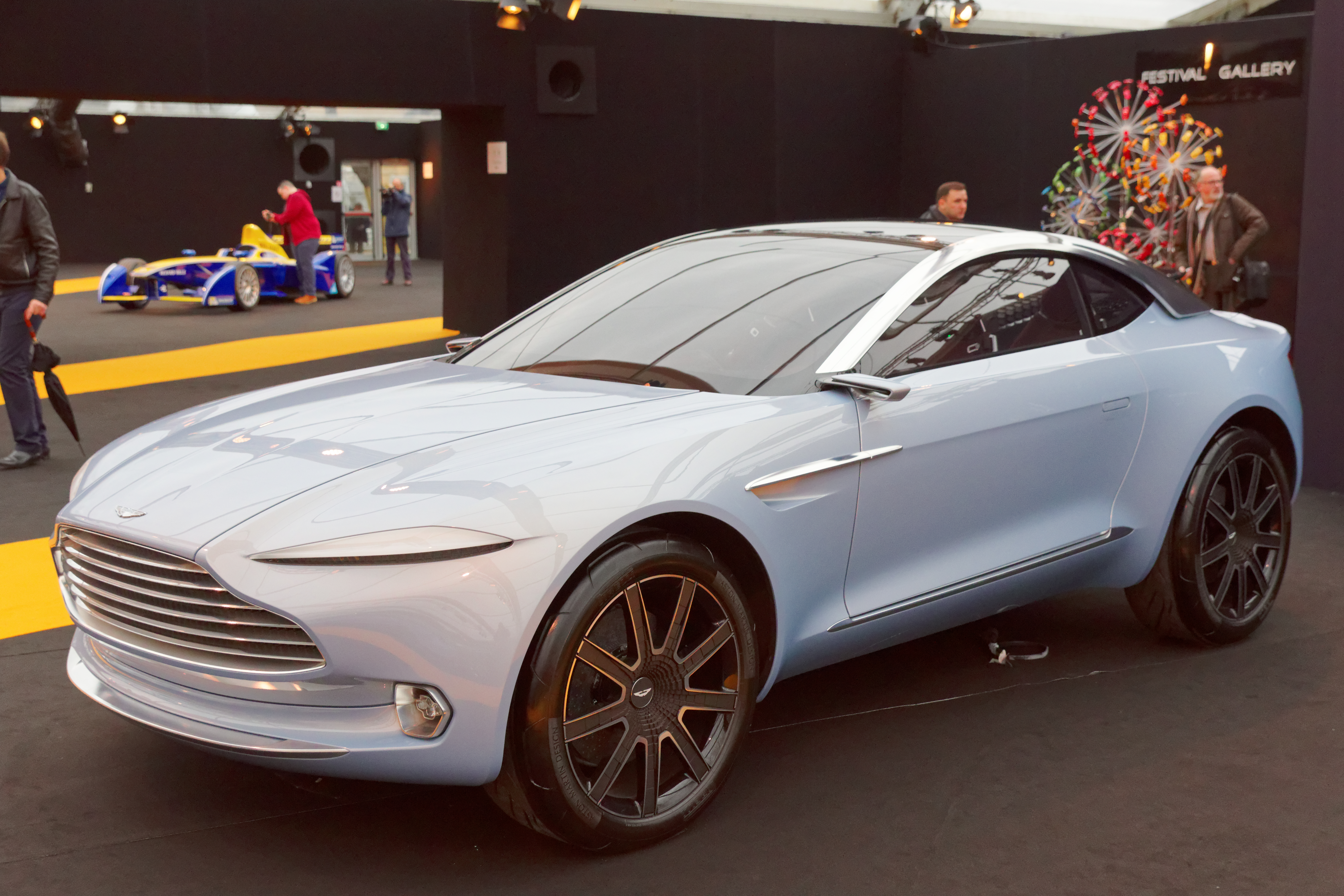 L'Aston Martin DBX exposée lors du festival automobile international 2016.